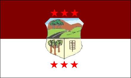 Bandera de la Municipalidad y Ciudad de Ñemby, Paraguay.